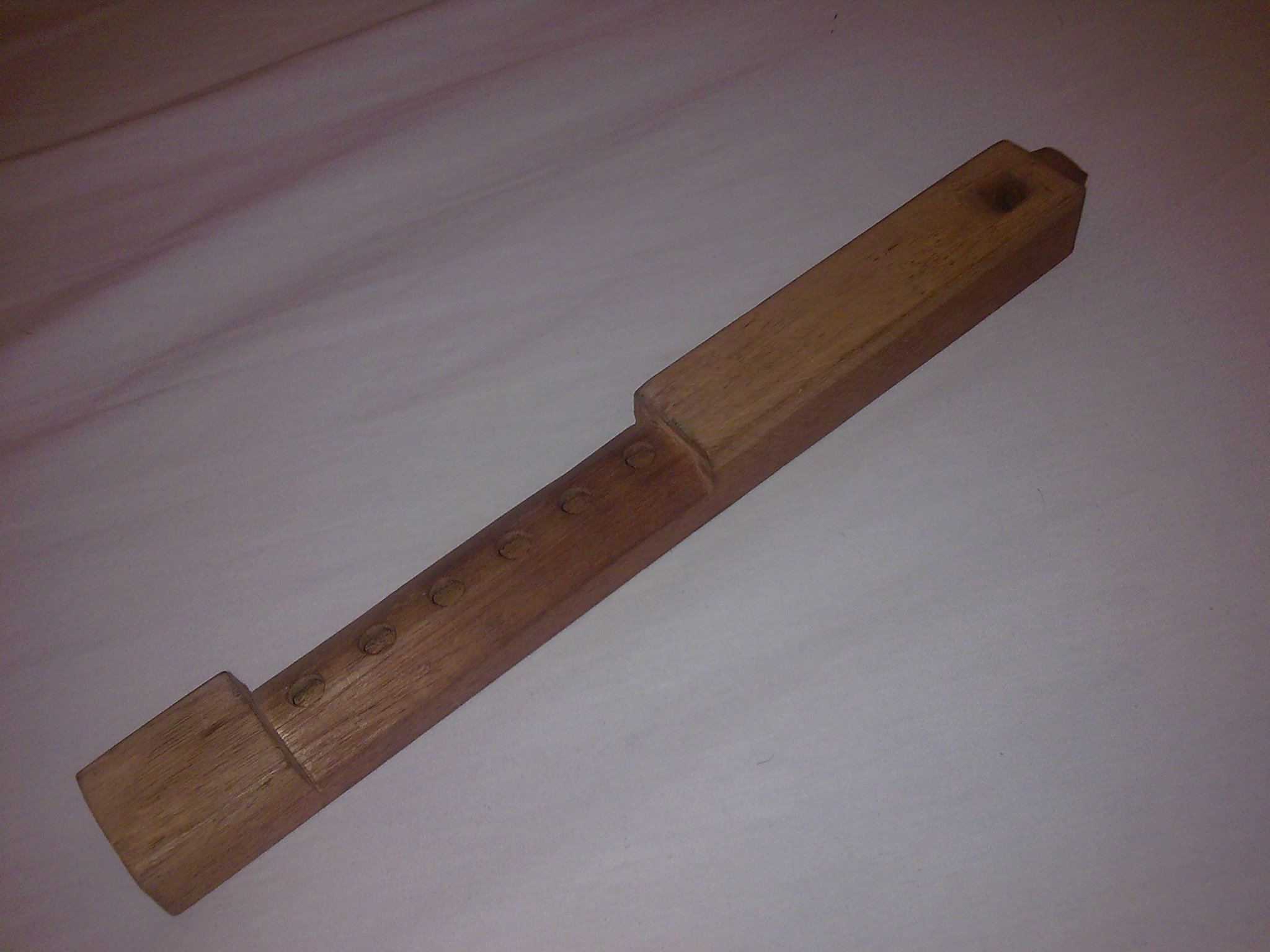 Imagen de la tarka, instrumento ancestral de los andes